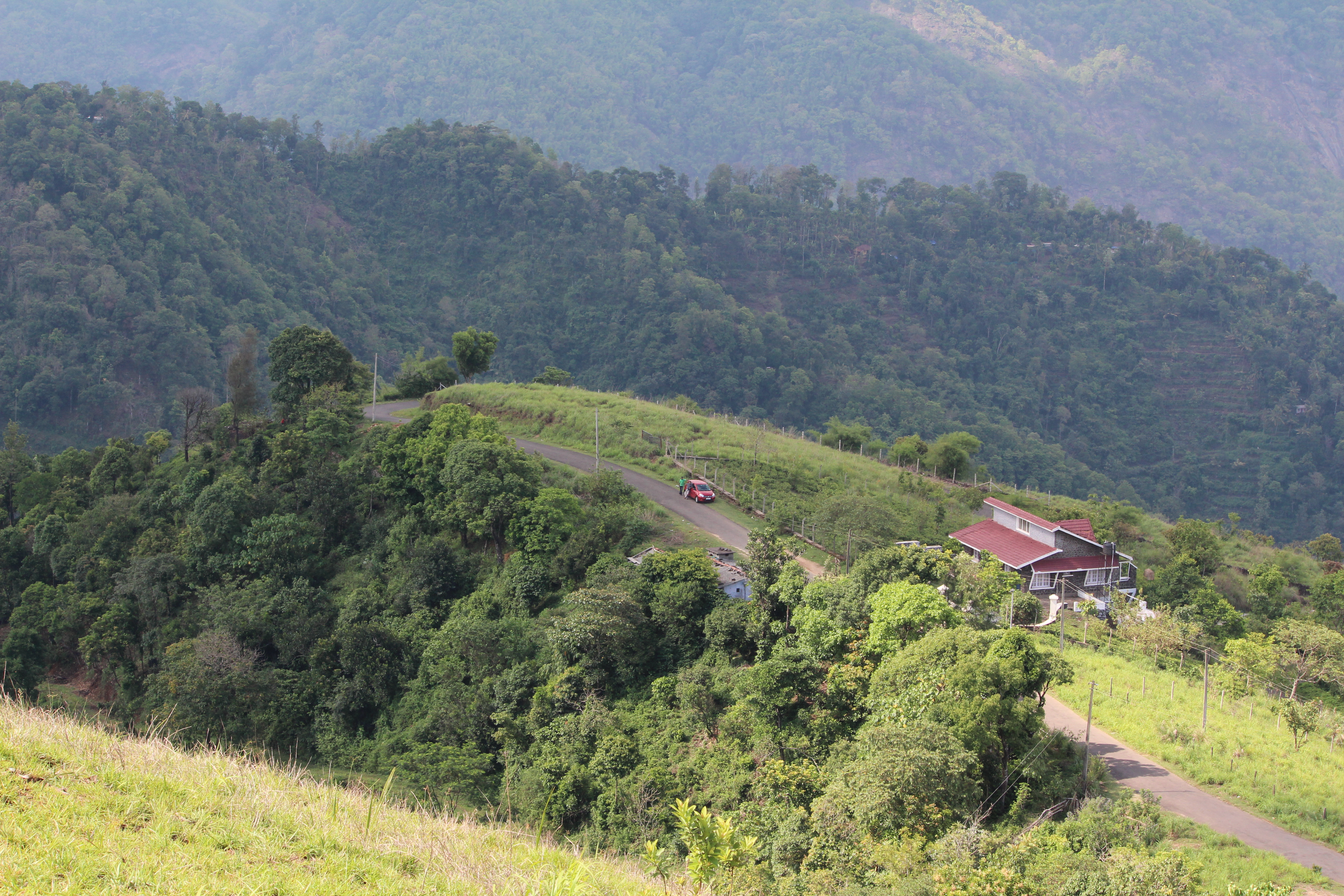 പാഞ്ചാലിമേട് വഴിയുള്ള കണയങ്കവയൽ പാത